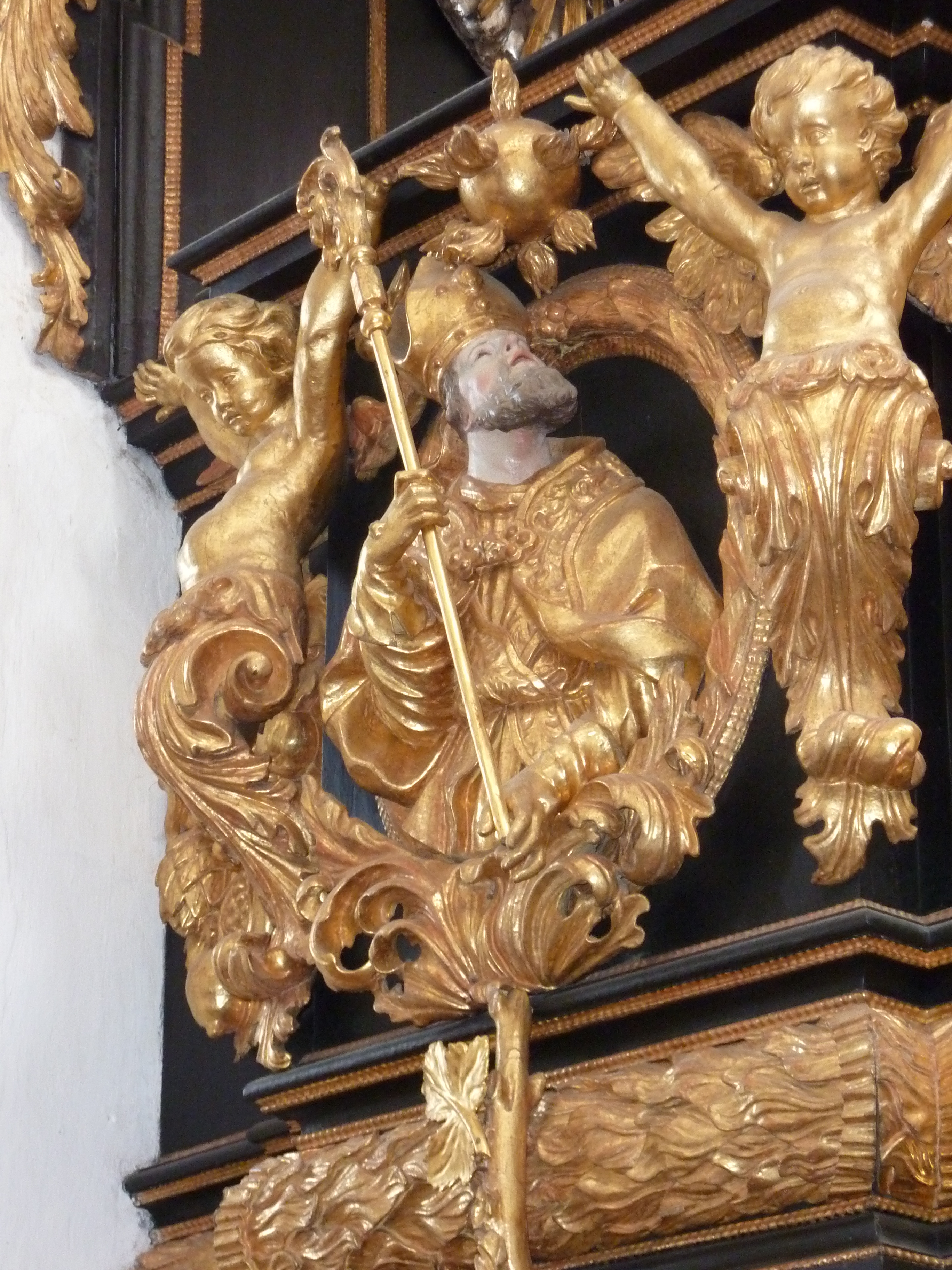 Pfarrkirche Mariä Himmelfahrt, ehem. Zisterzienserstiftskirche, Stift Baumgartenberg, Oberösterreich - Relief hl. Robert von Newminster an der Kanzel